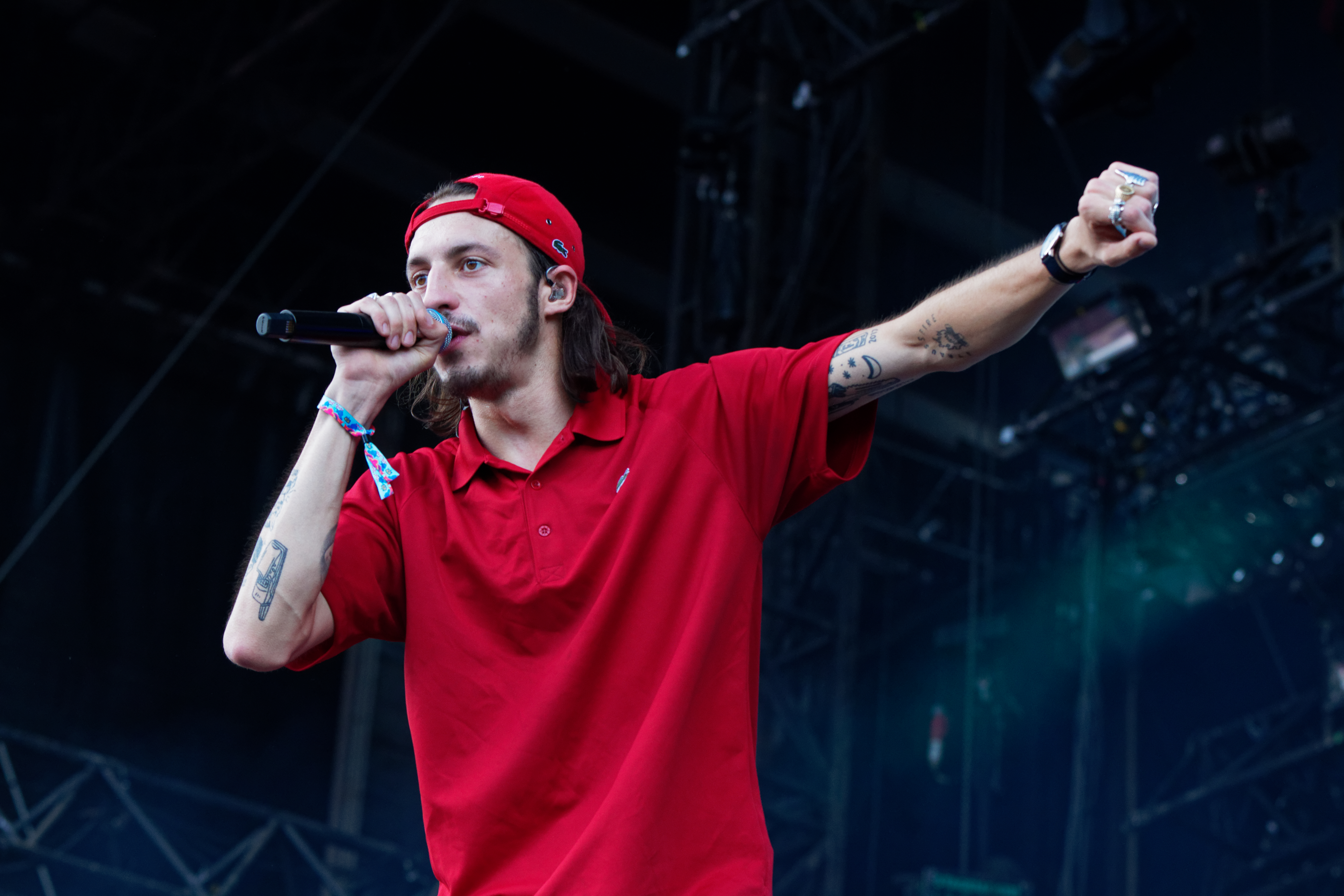 Roméo Elvis en concert lors du festival des vieilles charrues 2018.